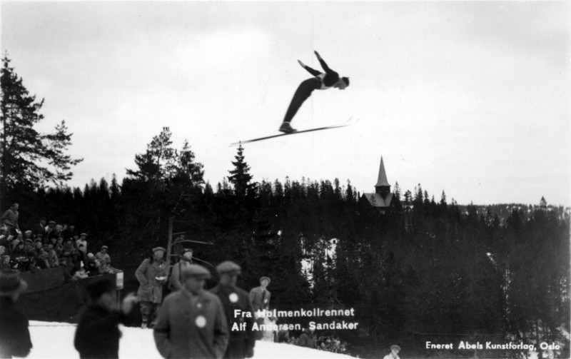 Norwegian ski jumper Alf Andersen in Holmenkollen